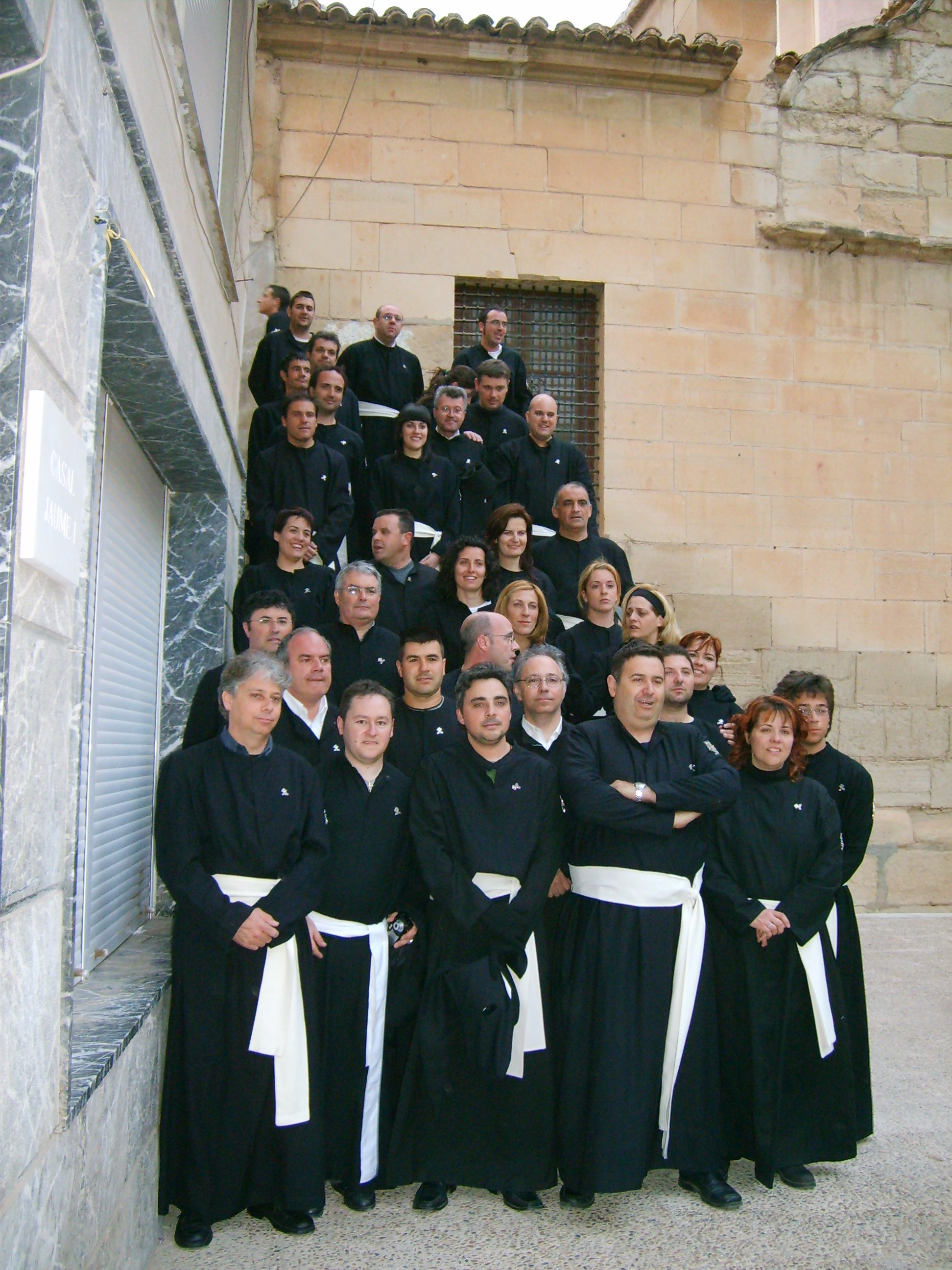 Costaleros de Ntra Sra de la Soledad